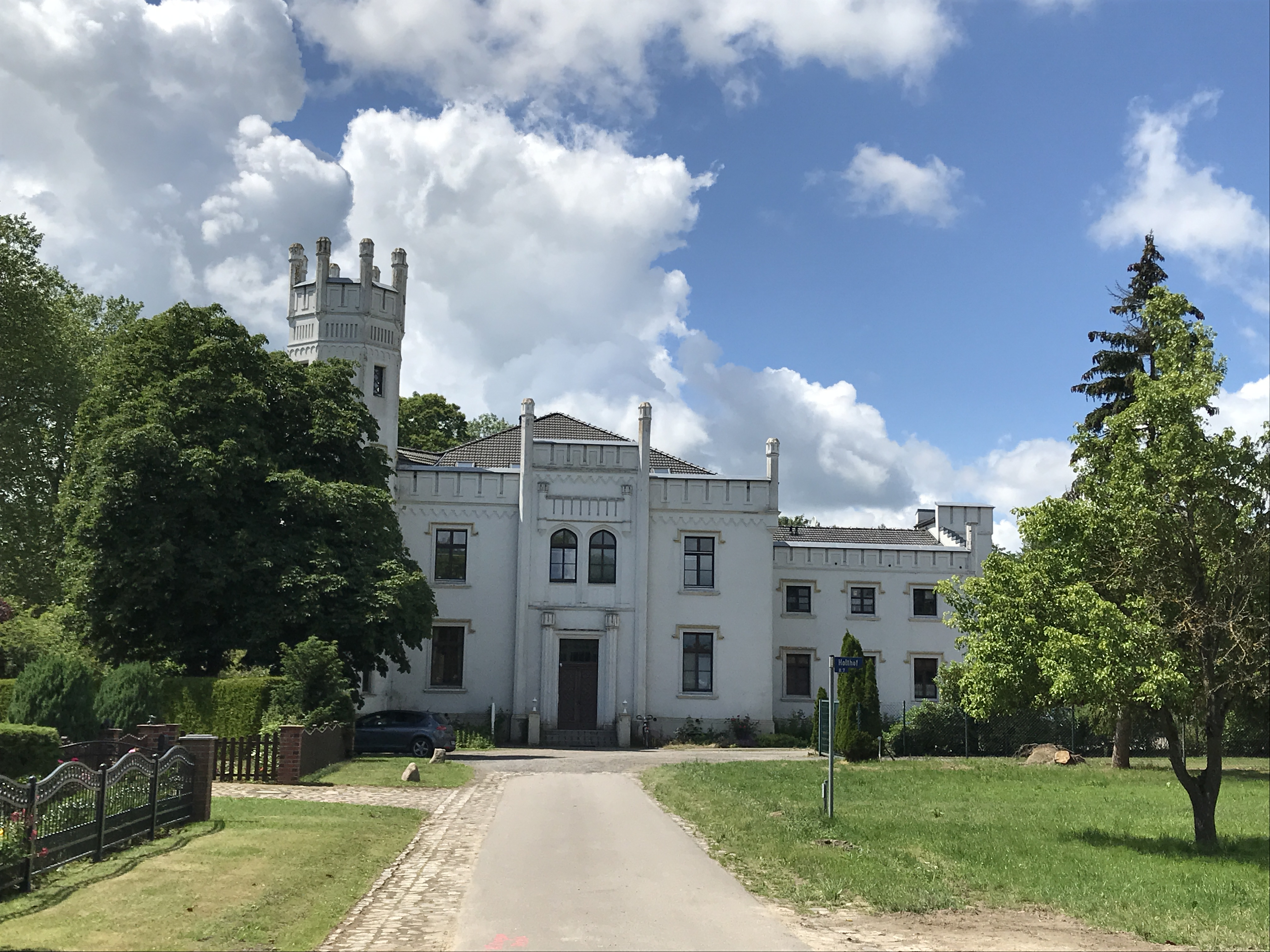 Denkmalgeschütztes Gutshaus in Holthof, ein Ortsteil der Gemeinde Splietsdorf in Mecklenburg-Vorpommern